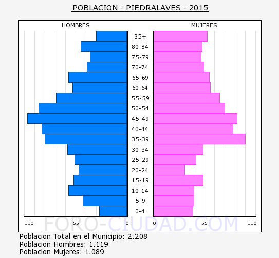 Población